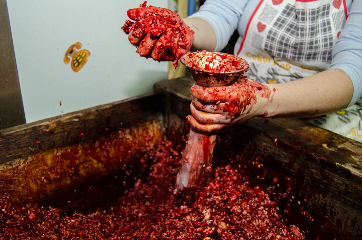 Llenado artesanal de morcillas de Burgos. Sandoval de la Reina.